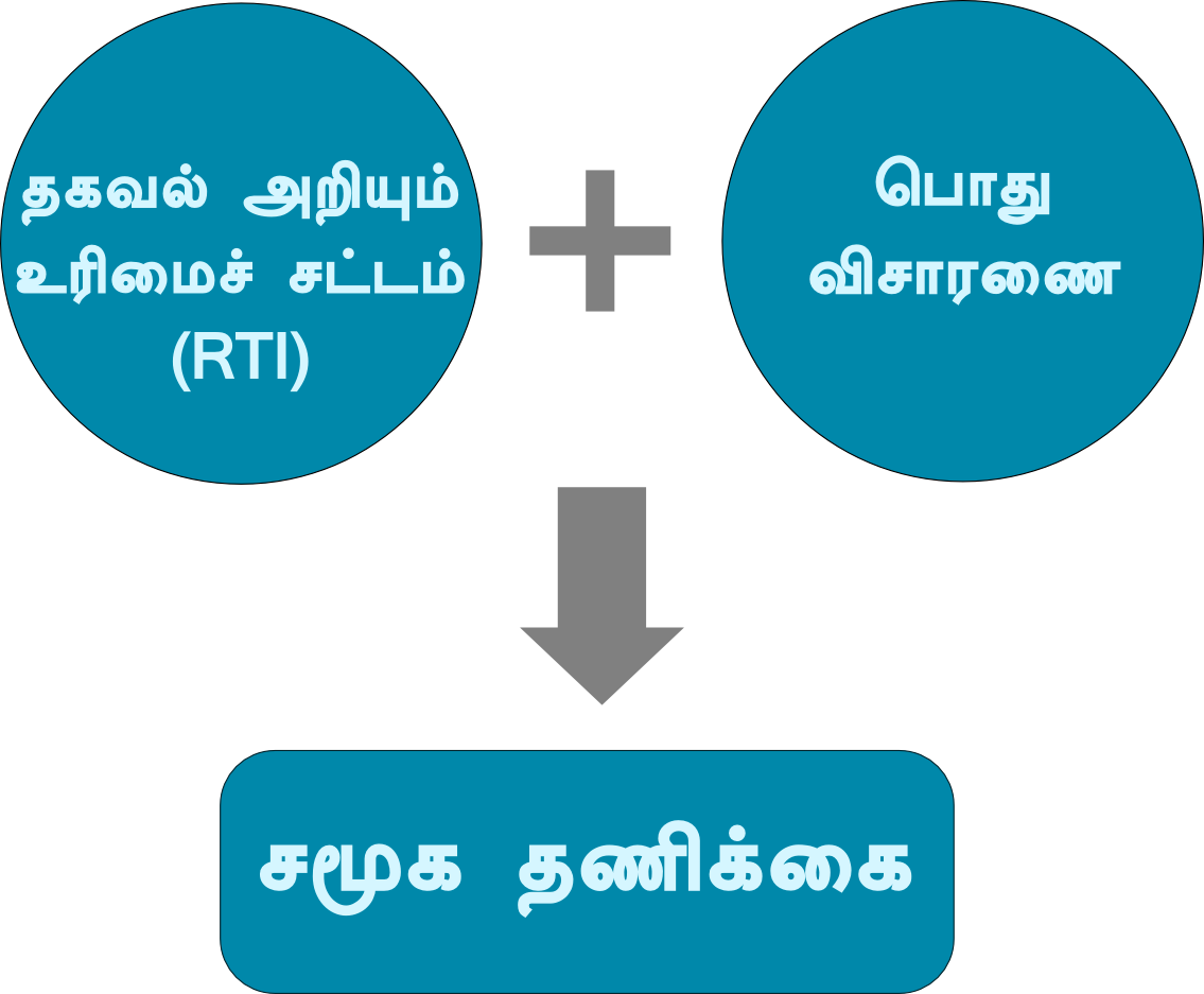 சமூக தணிக்கை விளக்கப்படம்